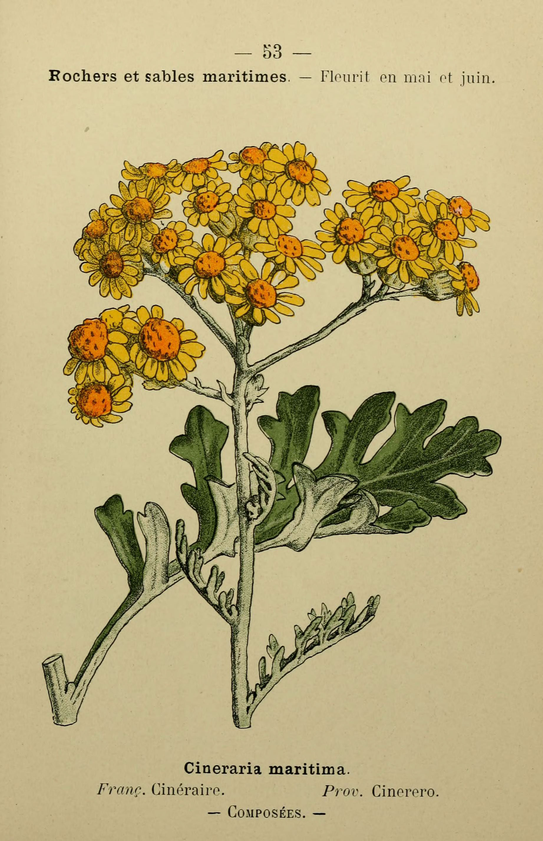 53 — Eochers et sables maritimes. — Flourit en mai ot juin. Cineraria maritima. Franc. Cinéraire. Prov. Cinerero. — Composées, —